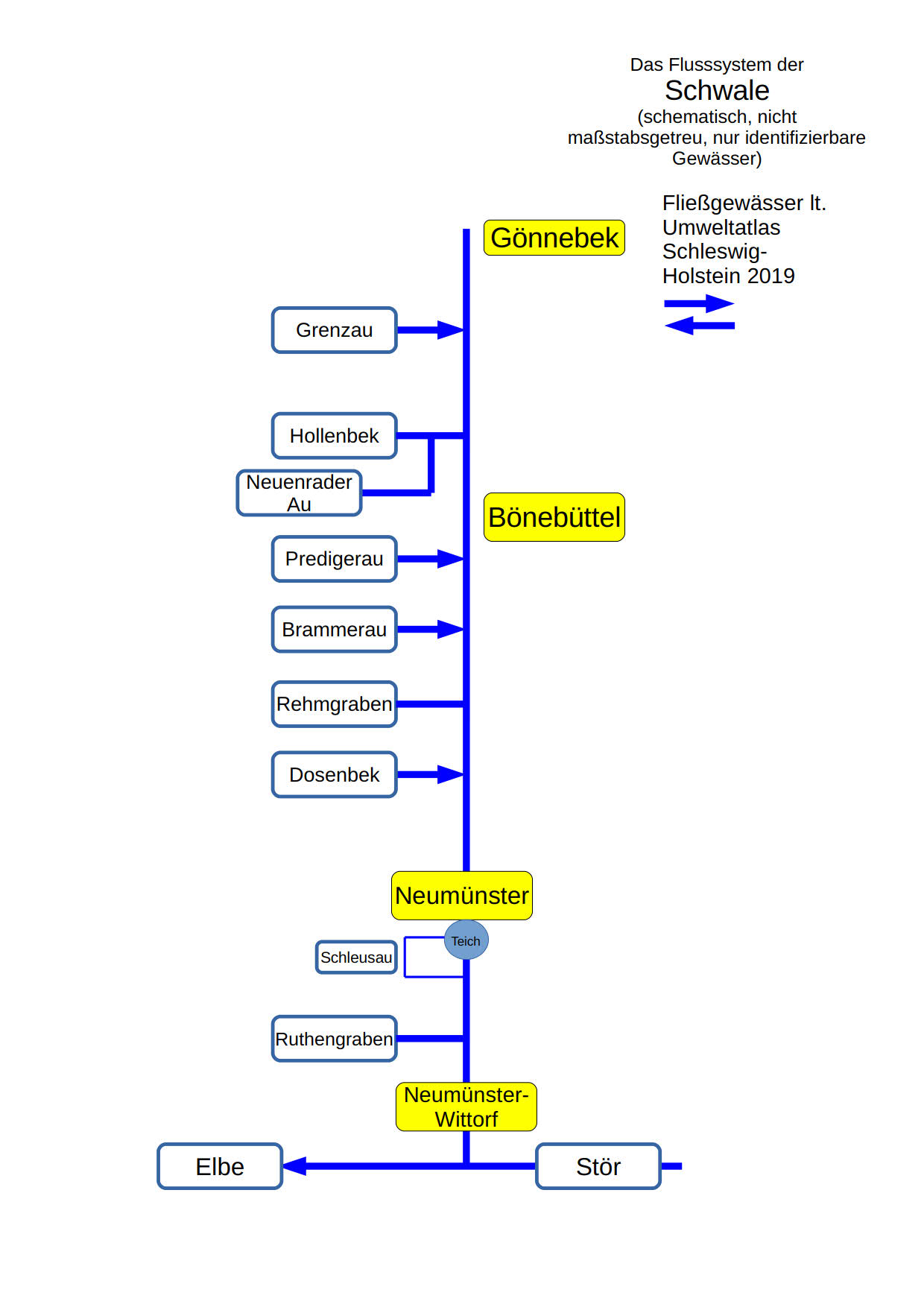 Schwale / Schematische Darstellung des Flusssystemes